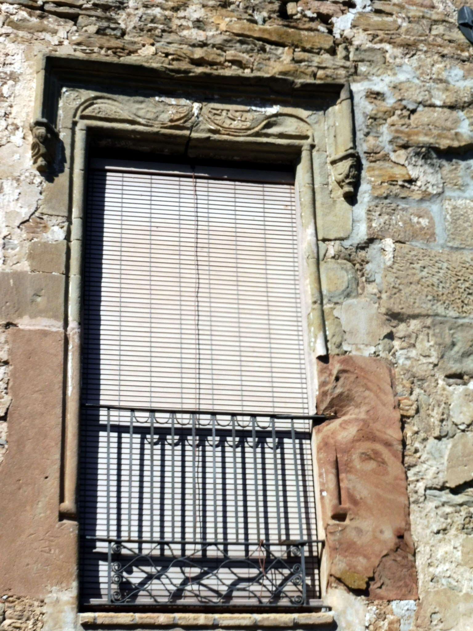 Masia de les Feixes de Coaner (Sant Mateu de Bages): el balcó